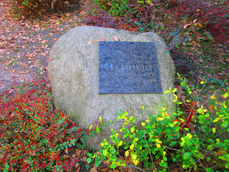 Сирецький дендрологічний парк